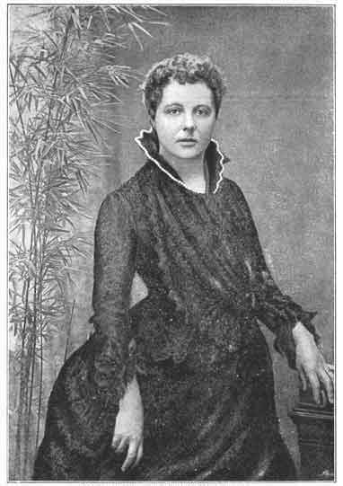 Annie Besant in 1885. Photograph by H.S. Mendelssohn